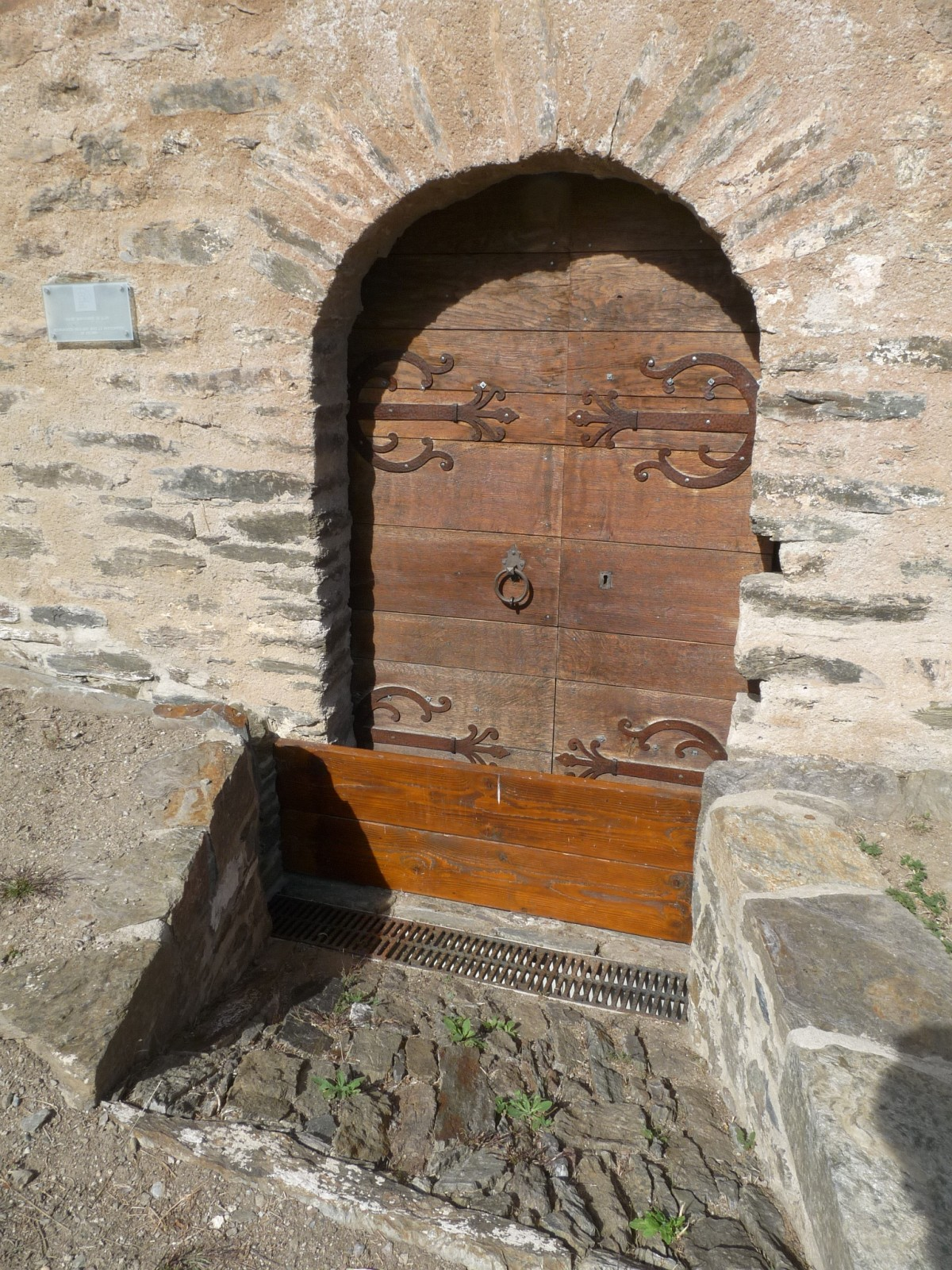 Église Saint-André de Llar , Pyrénées-Orientales, France